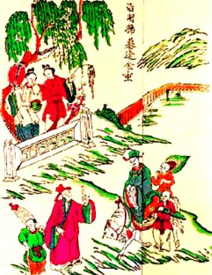 Thúy Kiều gặp Kim Trọng 中文（香港）: 越南民俗畫